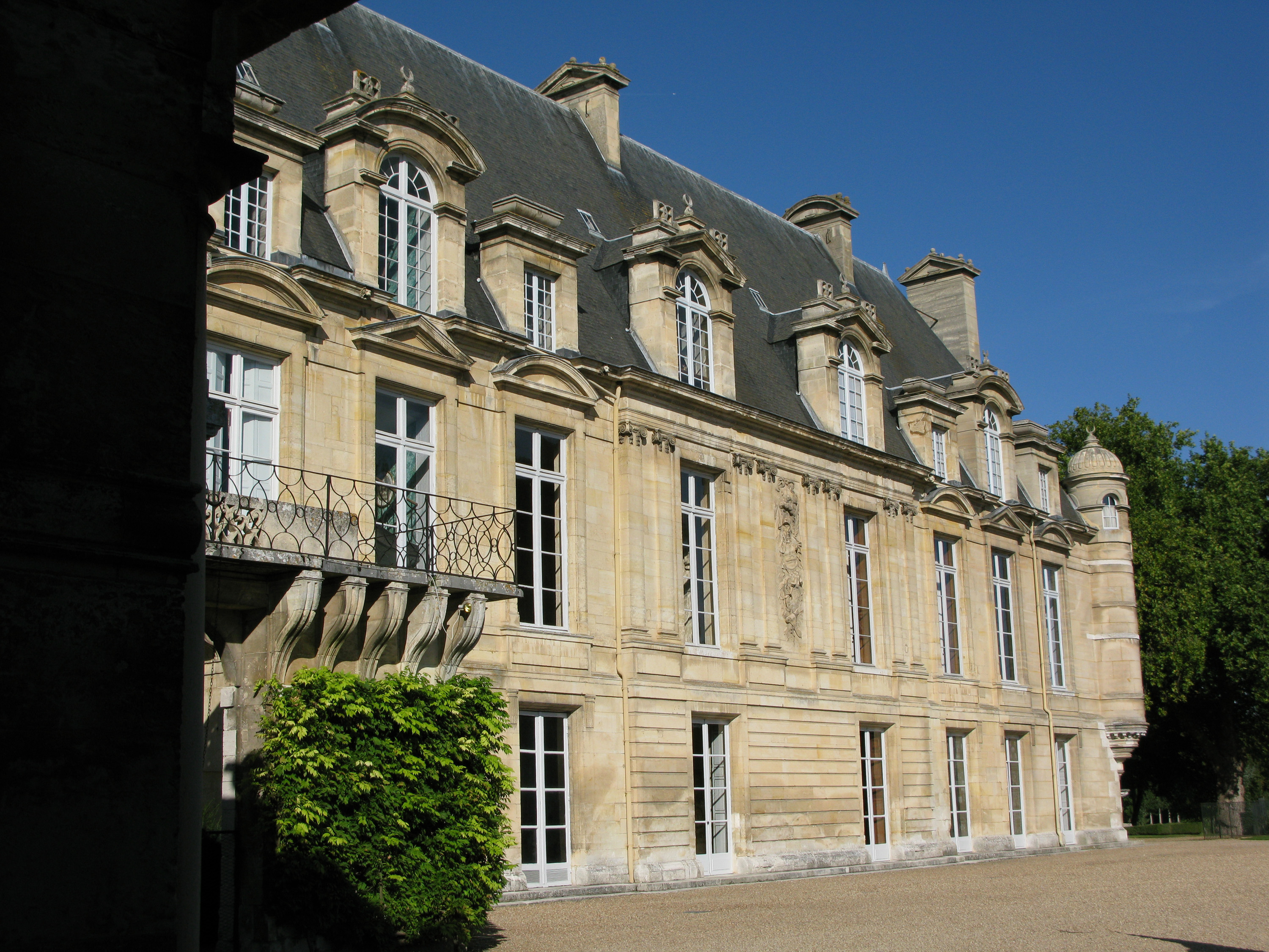 Le château d'Anet est un château Renaissance, situé en Eure-et-Loir, France Le château construit pour Diane de Poitiers par Philibert de l'Orme